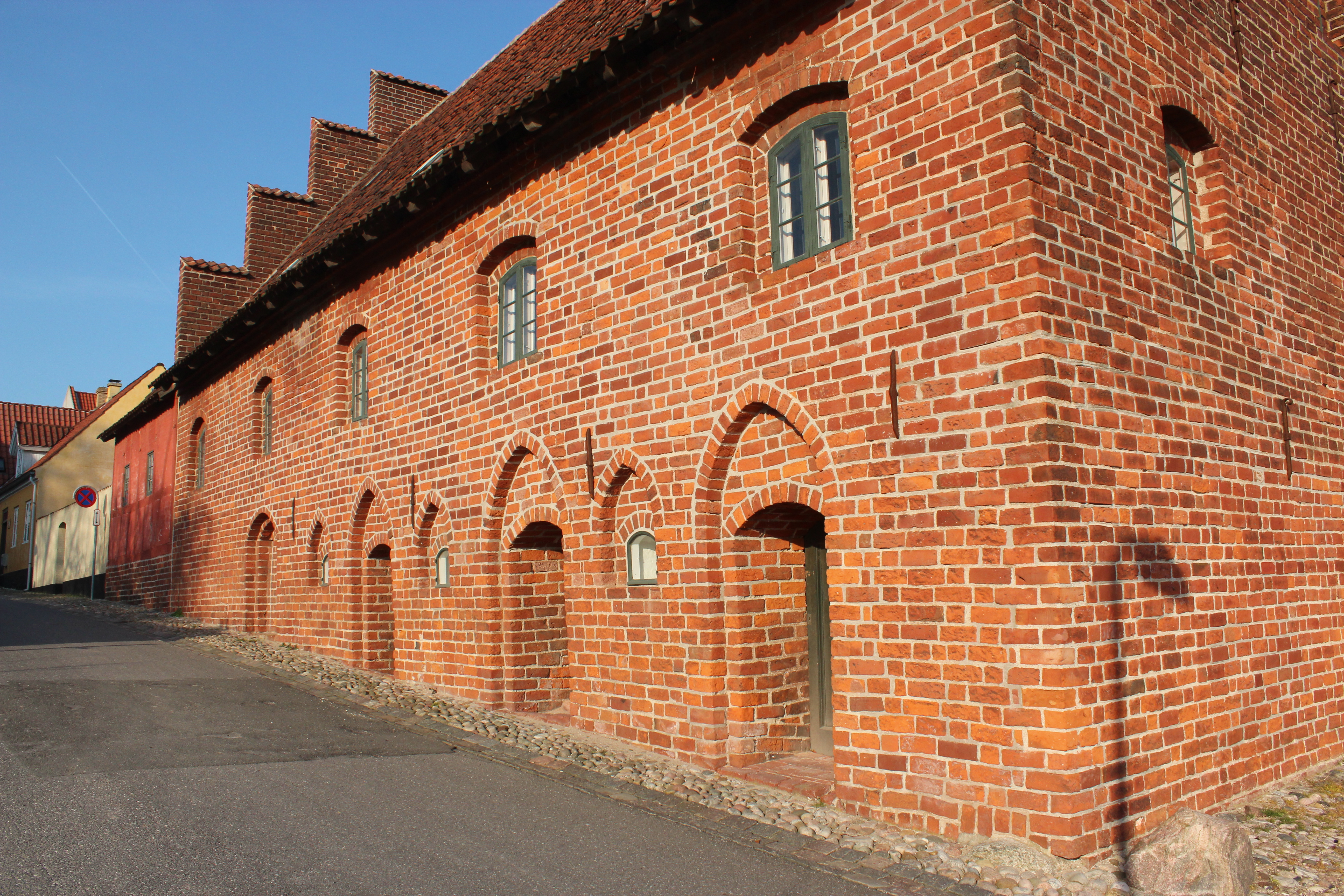 Kælderdøre og vinduer i vestsiden af huset. Kig mod nord op i Kompagnistræde.